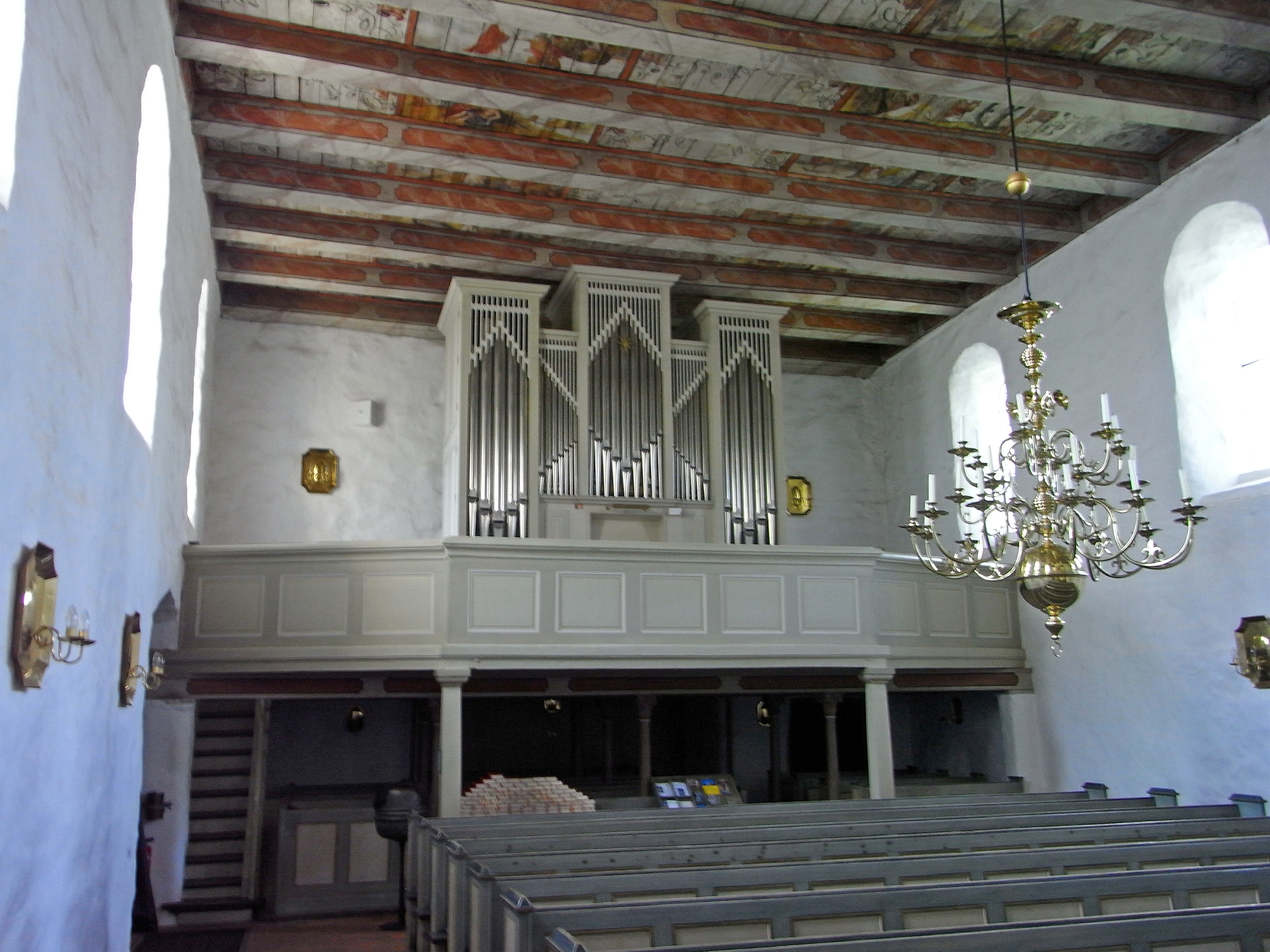 Orgel der Vicelinkirche, Pronstorf, Schleswig-Holstein